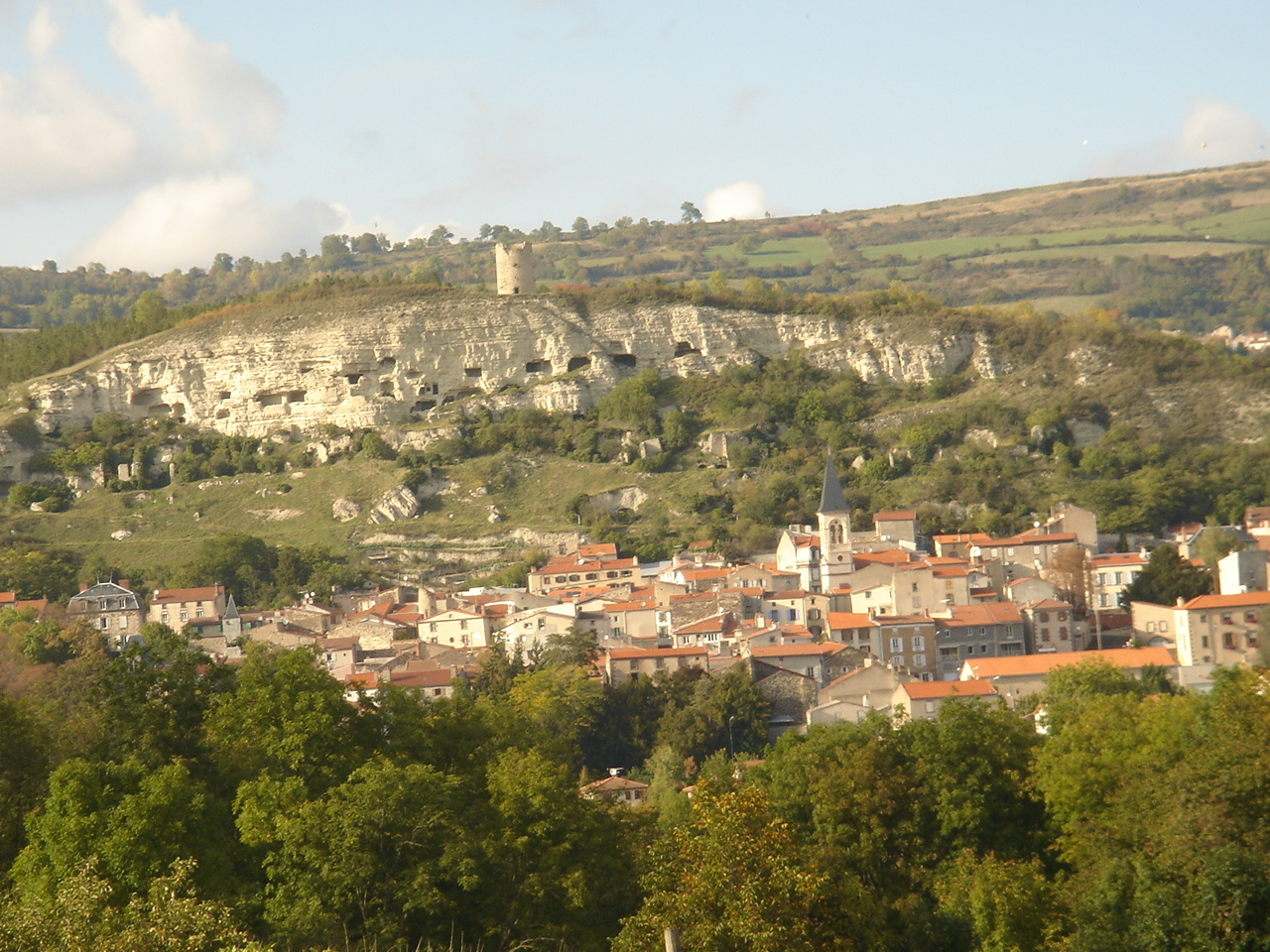 Vue de la ville de La Roche Blanche avec ses grottes et sa tour médiévale